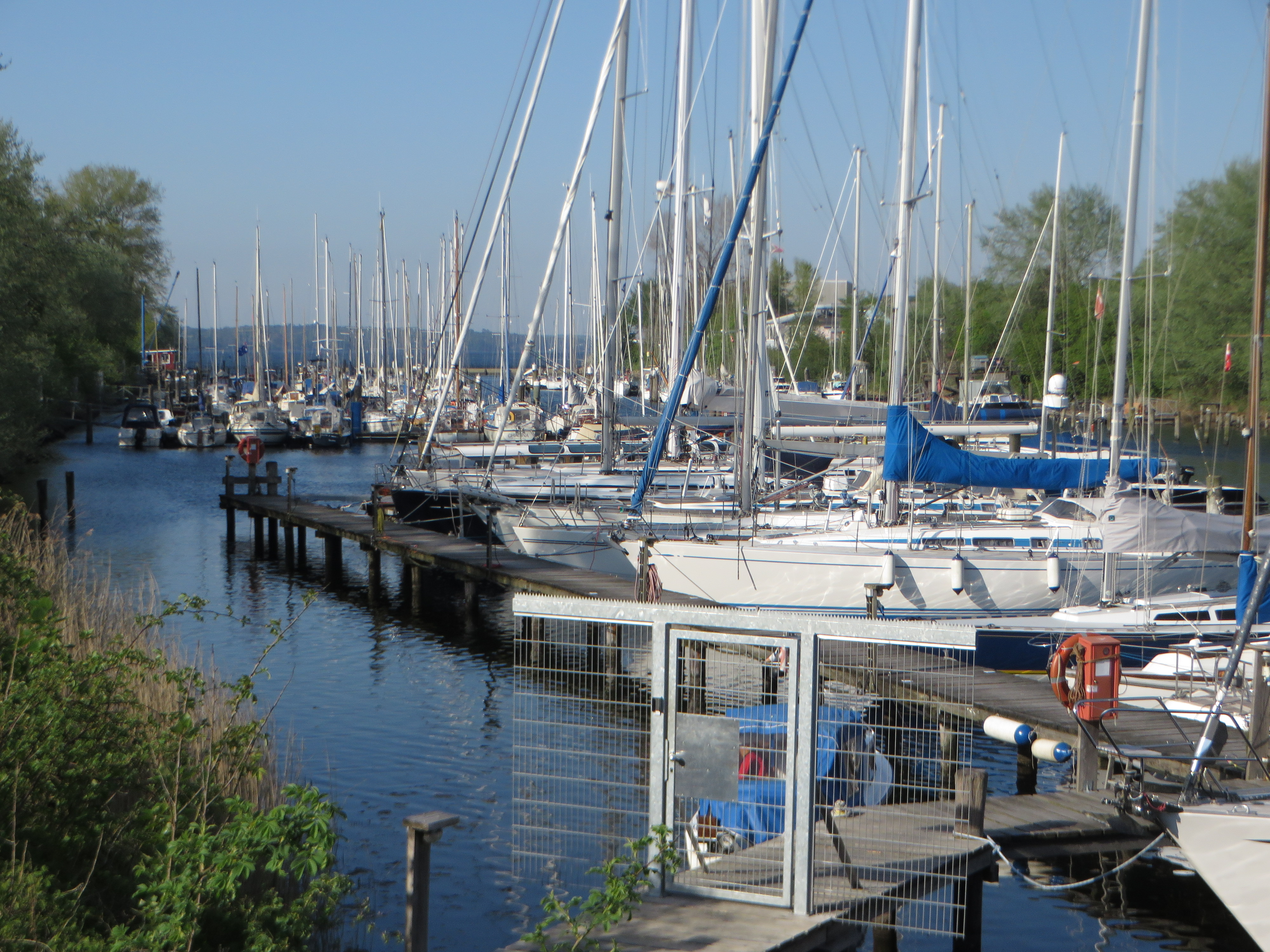 Yachthafen Kielseng (Flensburg Mai 2016), Bild 13